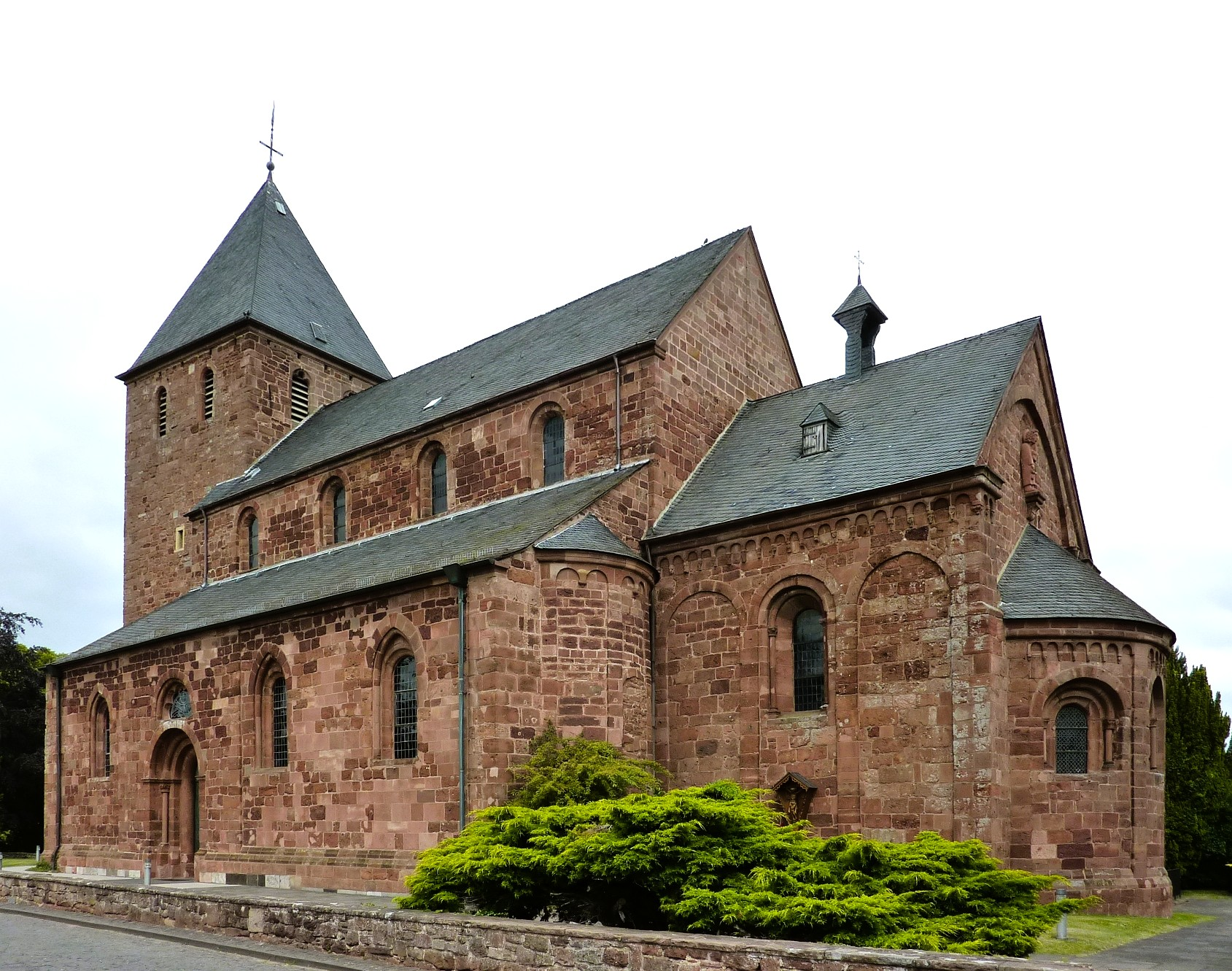 Sankt Johannes Baptist (Nideggen)